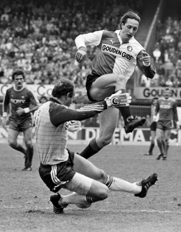 Feyenoord tegen AZ'67 5-2; Johan Cruyff springt over doelman Treytel